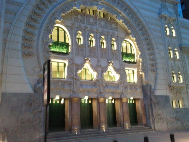 Fachada restaurada del Teatro Campos Elíseos, en la calle Bertendona de Bilbao, durante muchos años cerrado y recientemente recuperado.